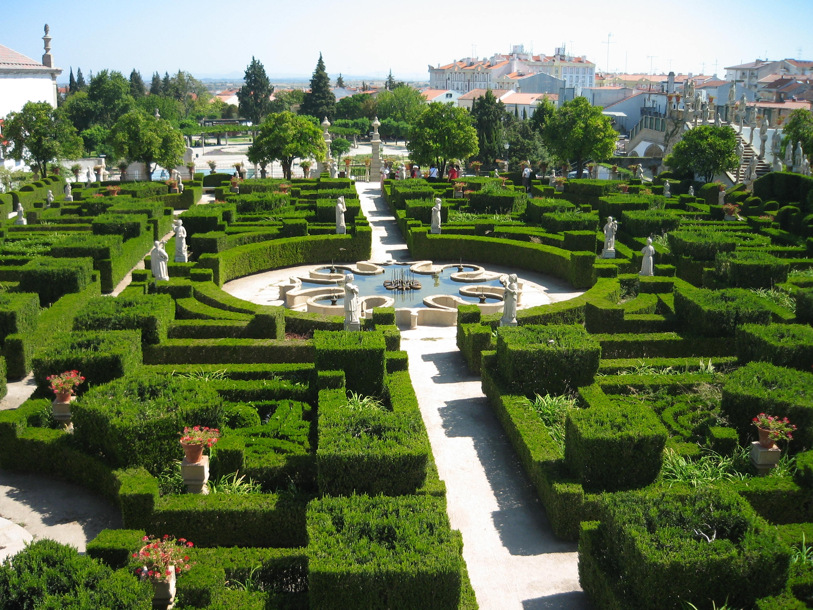 Vista geral do Jardim do Paço Episcopal, mandado construir no seculo XVIII pelo Bispo João de Mendonça.Castelo Branco. This building is classified as Em vias de classificação. This file was uploaded for Wiki Loves Monuments in Portugal with the unique identifier 97010282.